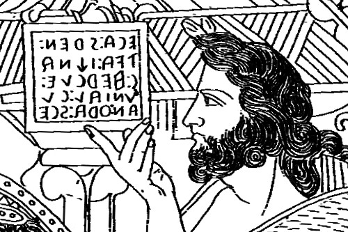 Bronzespiegel von Volterra (Archäologisches Nationalmuseum Florenz)Originalbeschreibung der Quelle: „Uni nursing the adult Hercle in front of divine witnesses. Etruscan mirror from Volterra in Florence, Museo Archeologico Nazionale.“